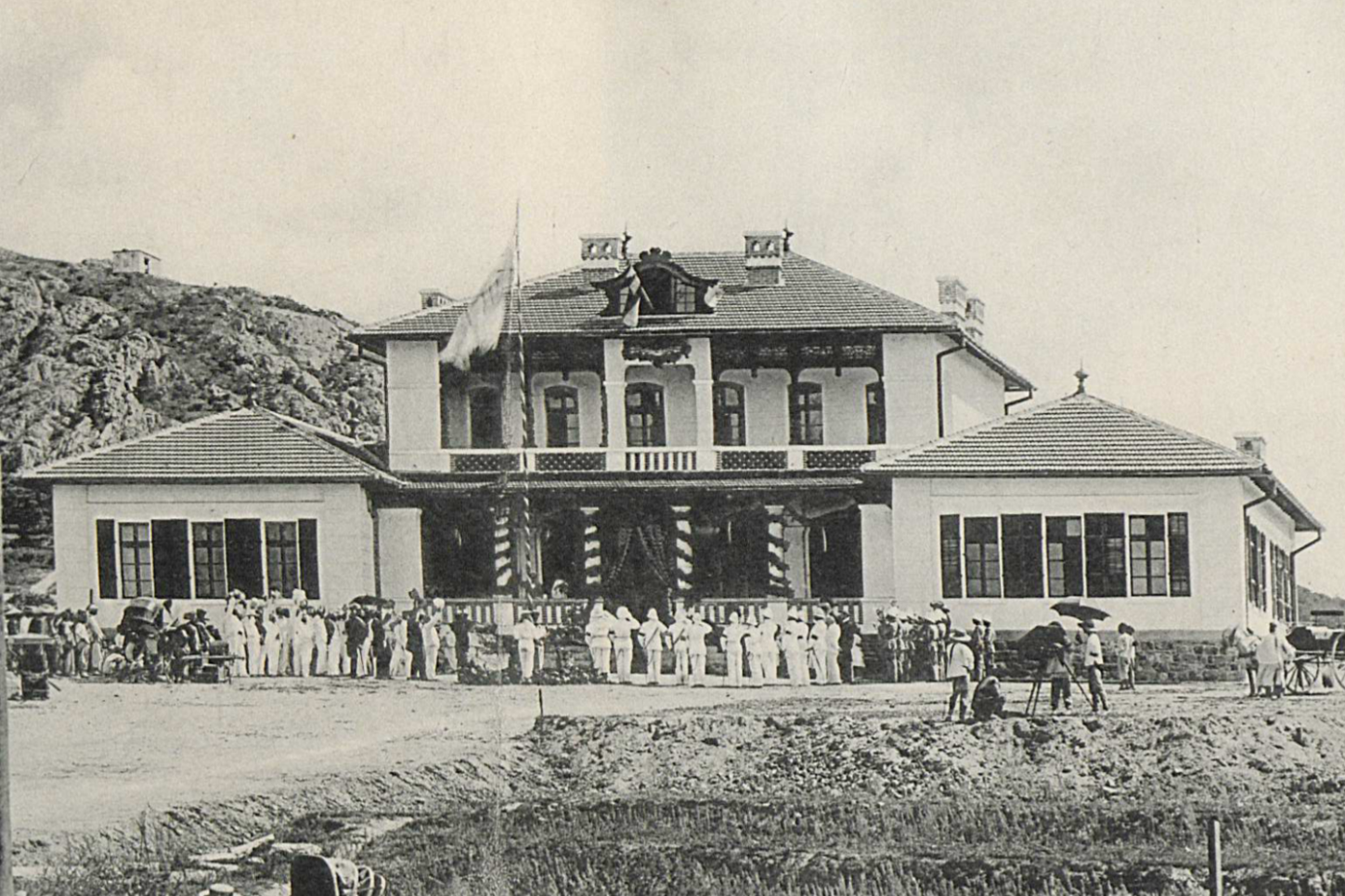 青岛督署学校教学楼落成仪式